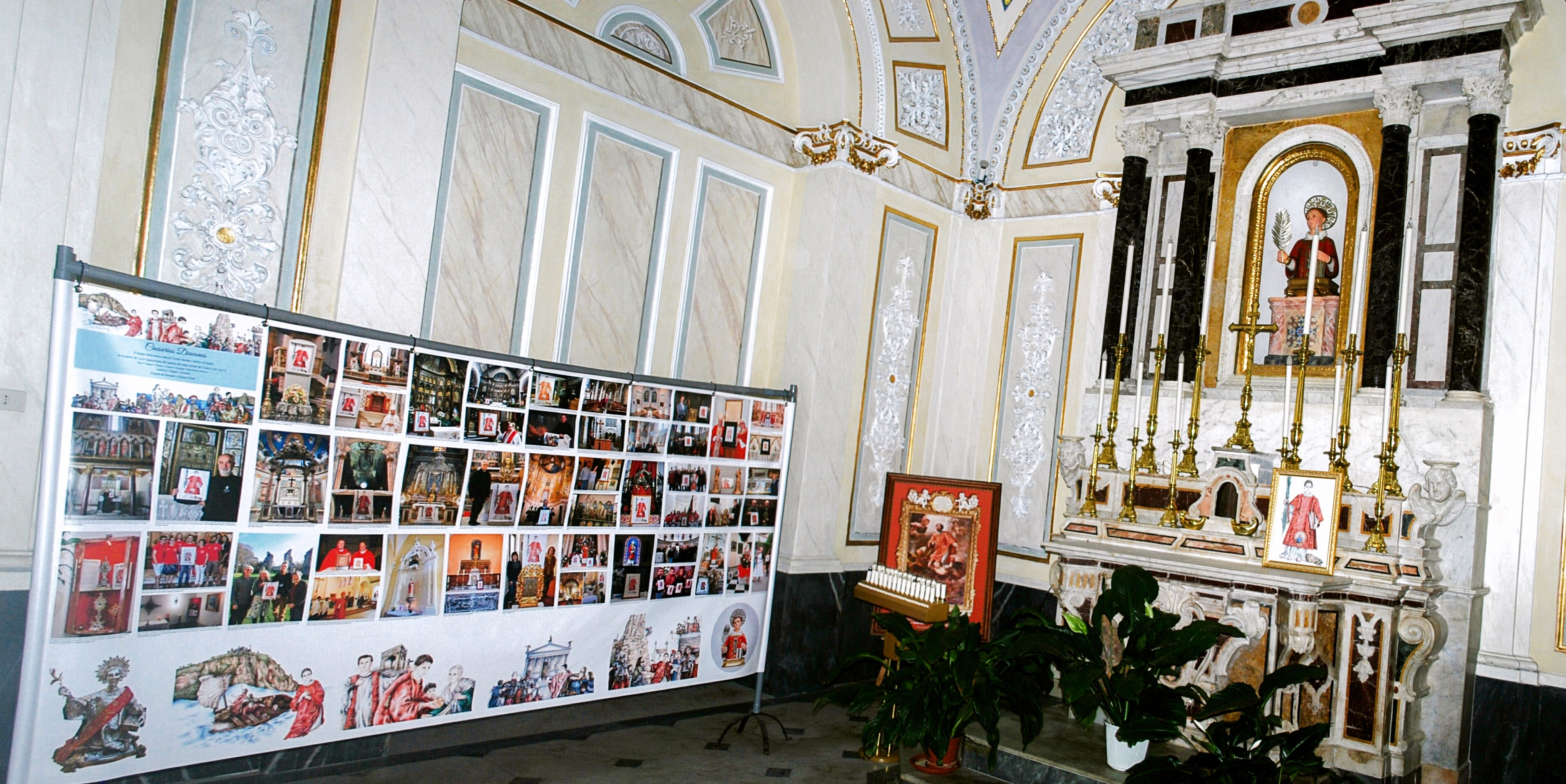 Mostra "Caesarius Diaconus: il viaggio della nuova icona di Cesario diacono e martire nel mondo in occasione del 1910° anniversario del martirio del santo tutelare dei Divi Cesari", Parrocchia San Cesario Martire, Cesa (Ce) - 28 luglio 2017 (foto Cesario Errico)